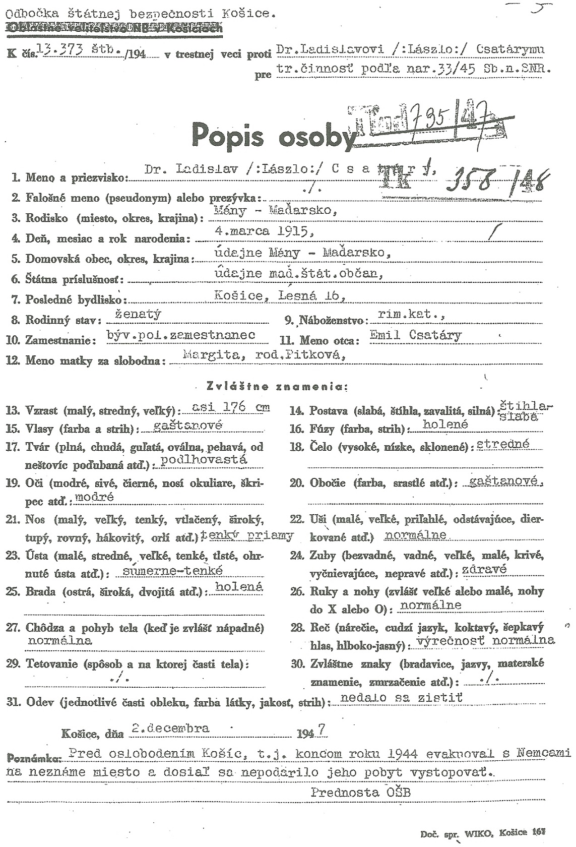 A kassai népbíróság 0Tk 358/1948. számú körözésben kiadott adatai és személyleírása Csatáry Lászlóról